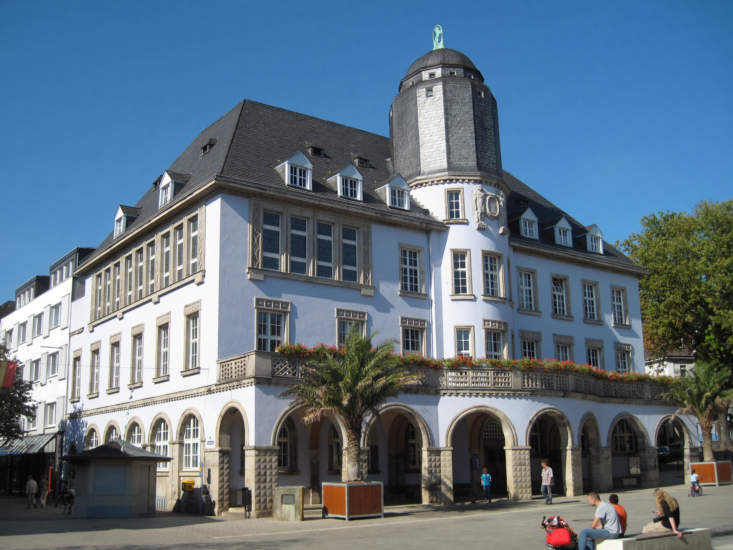 Altes Rathaus (1912). Runder Mittelturm, zehneckige Schieferhaube mit Laterne und Bekrönung. Eingangsbereich Laubengang mit Rundbögen und darüber liegendem Balkon. Menden (Sauerland), Hauptstraße 48. This image shows a heritage building in Germany, located in the North Rhine-Westphalian city Menden (Sauerland) (no. 10).